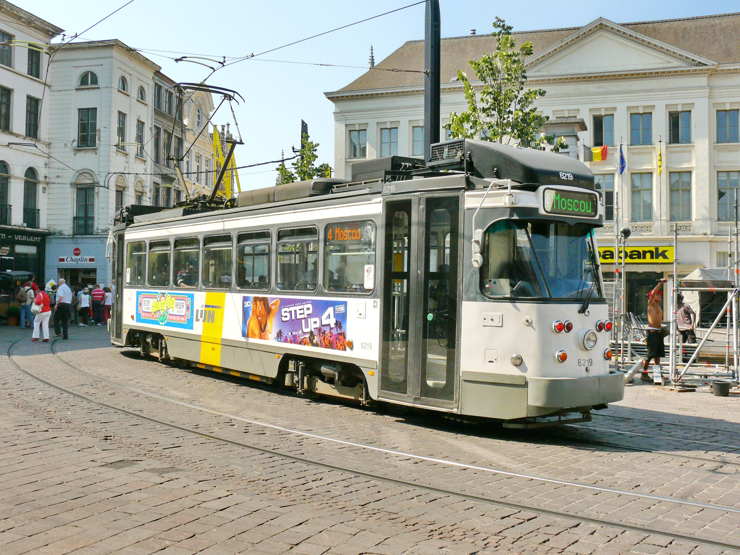 Tramway de Gand - Rame PCC 6219 sur la ligne 4 à Groentenmarkt